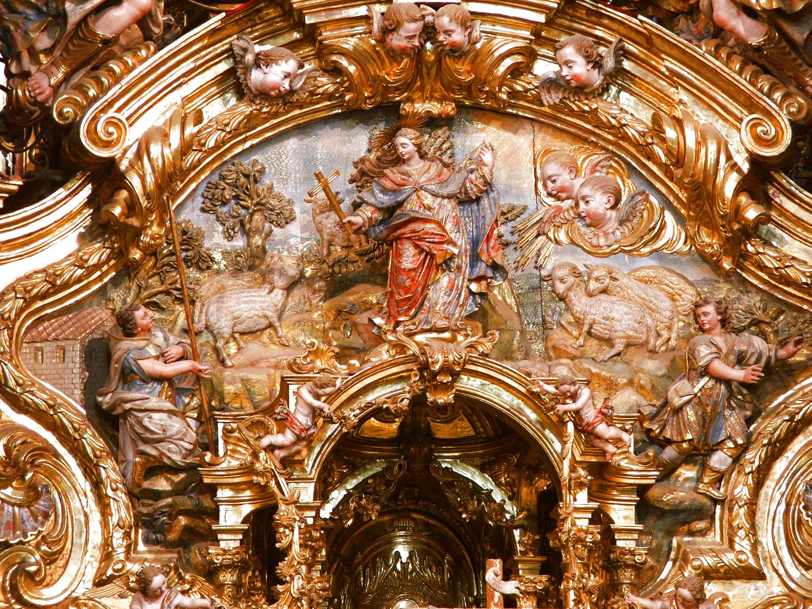 Santuari del Miracle (Riner, Solsonès) - Església - Retaule barroc: l'Aparició